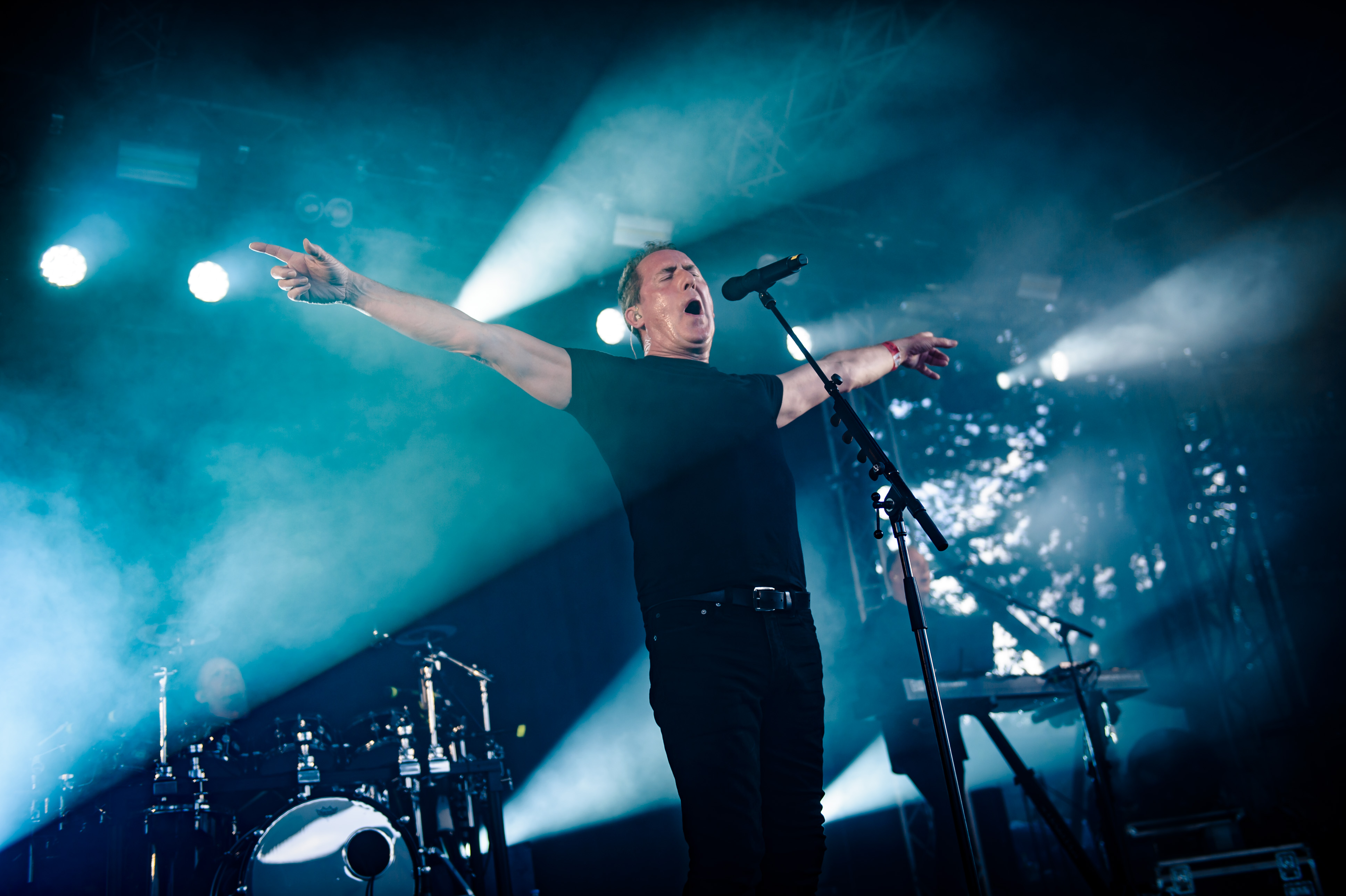 'Amphi Festival 2018; Tanzbrunnen Köln': 'OMD'